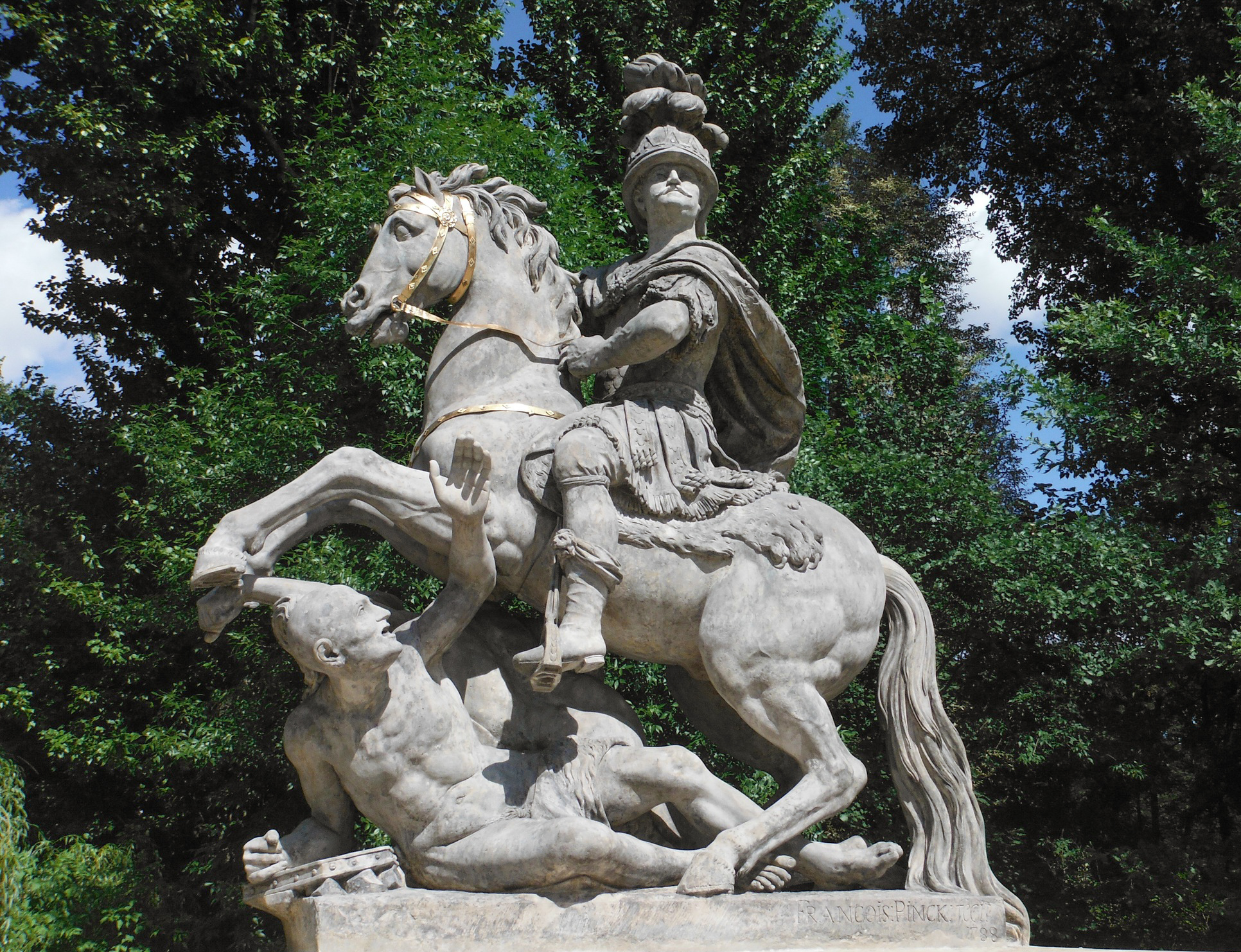 Pomnik Jana III Sobieskiego przy Agrykoli w Warszawie.